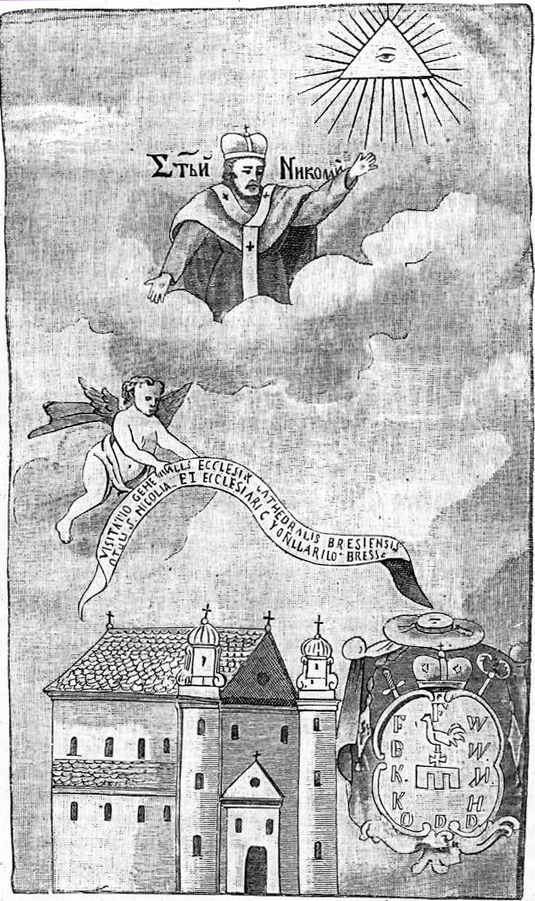 Мікалаеўская царква ў Берасці. Выява царквы з тытульнага ліста візітацыйнай кнігі берасцейскіх цэркваў. 1759 г.